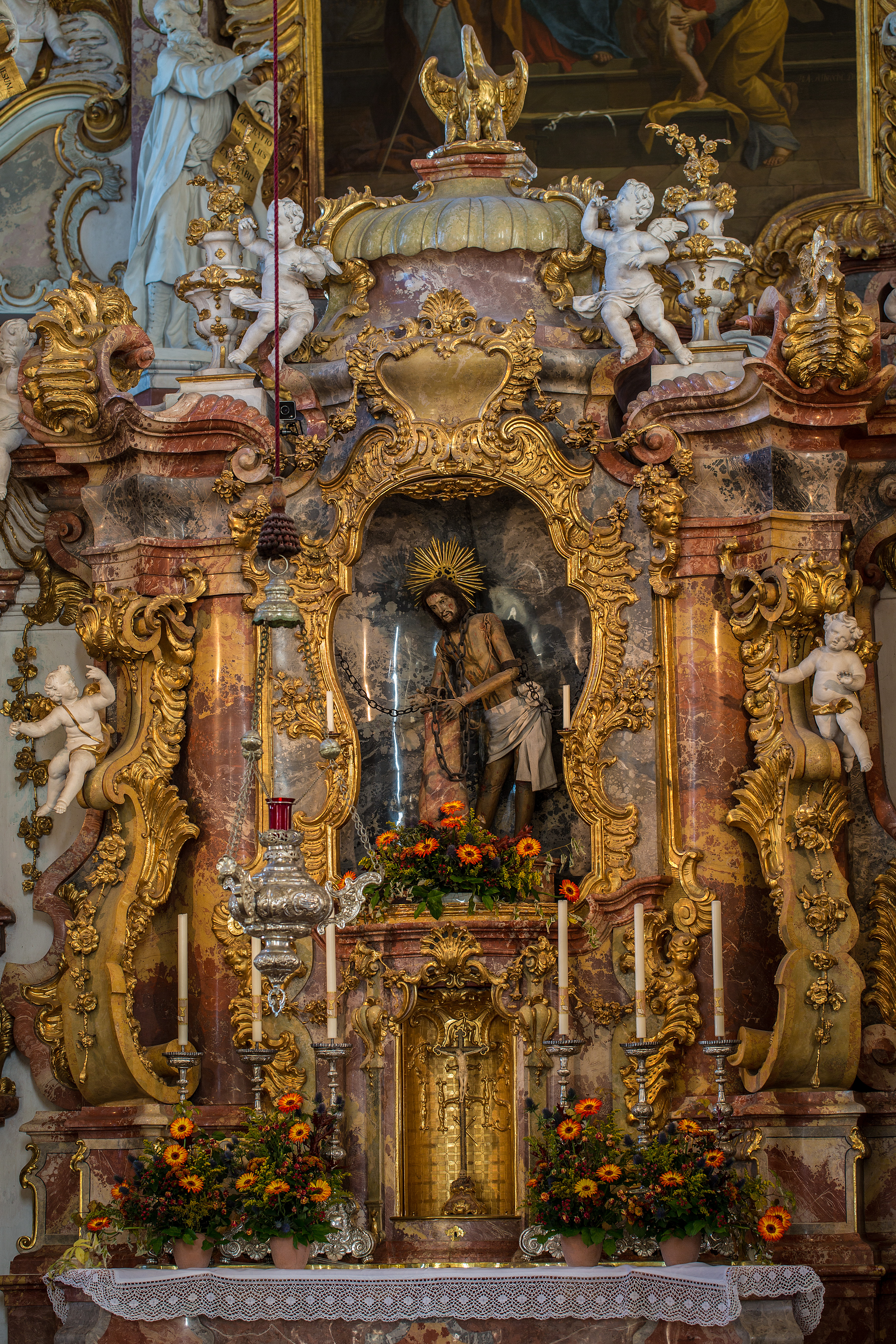 Gnadenbild des gegeißelten Heilandes im Altar der WieskirchThis is a photograph of an architectural monument.